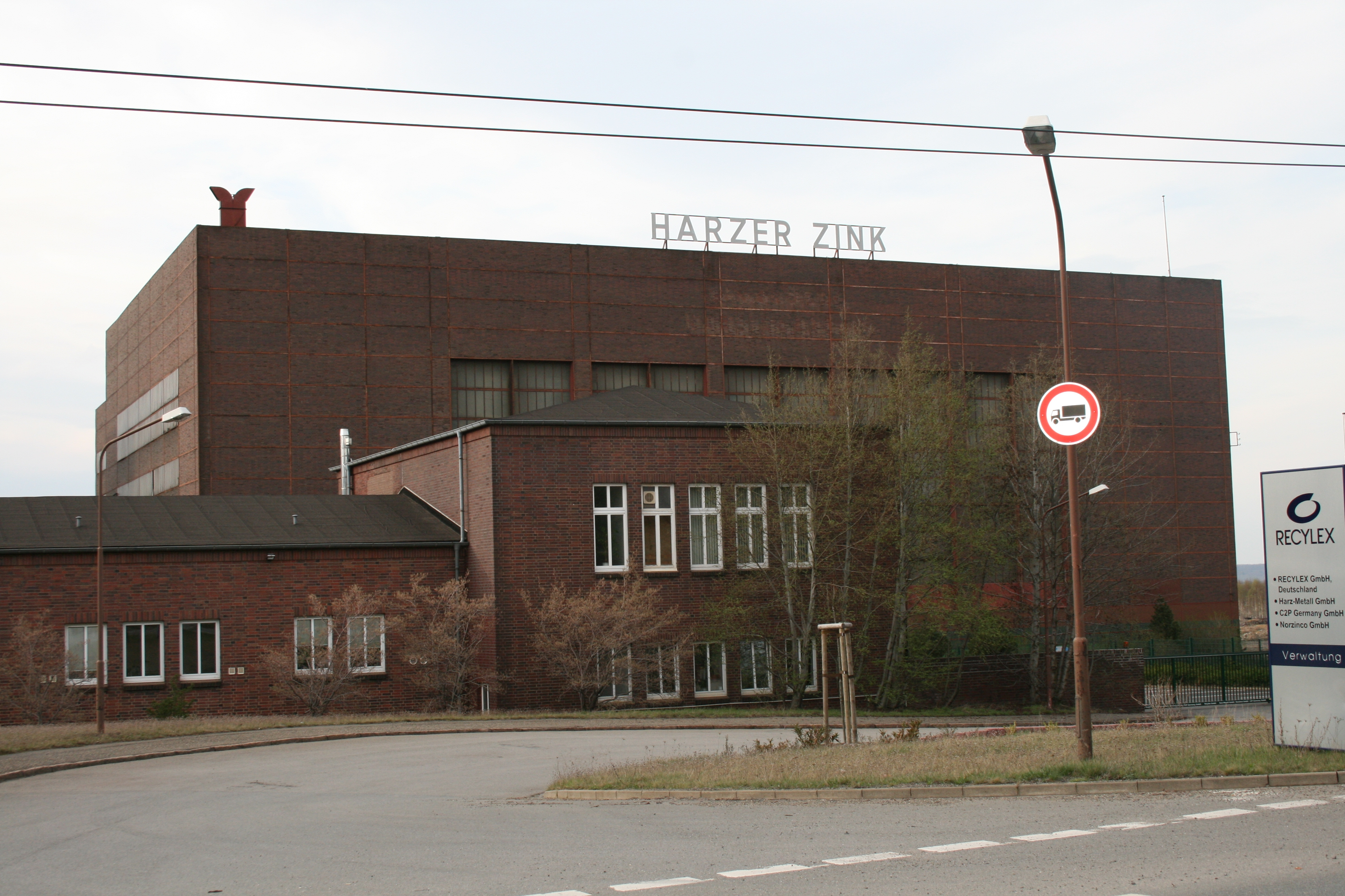 Eingangssituation der Zinkhütte Harlingerode (ZHH) mit 20-Tage-Lager